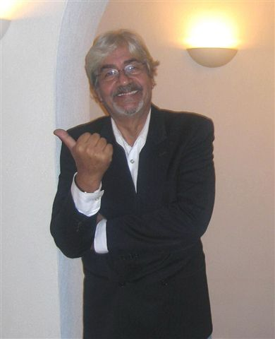 Il cantante italiano Beppe Cardile in un'immagine degli anni duemila.